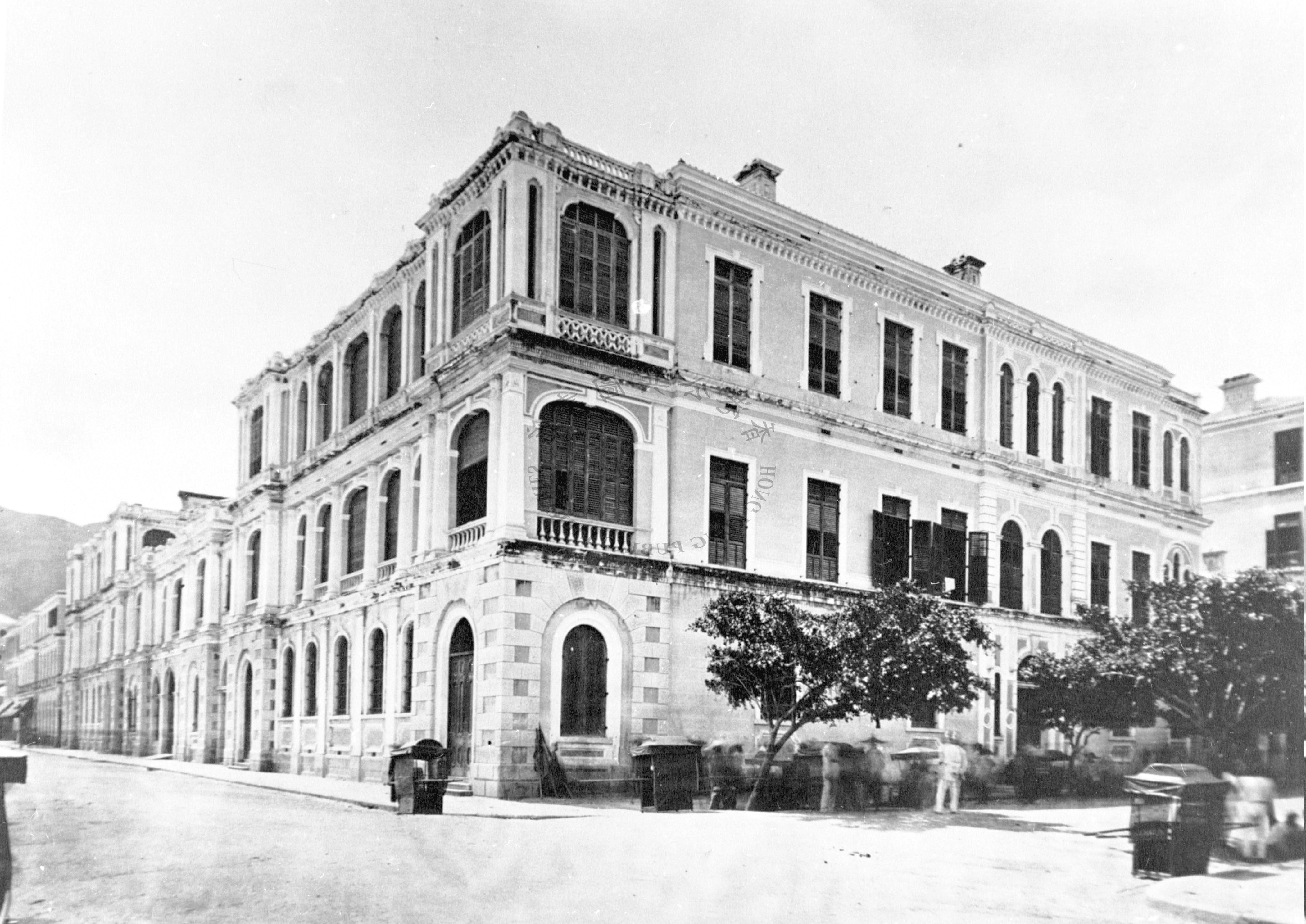 Dent Building, Hong Kong